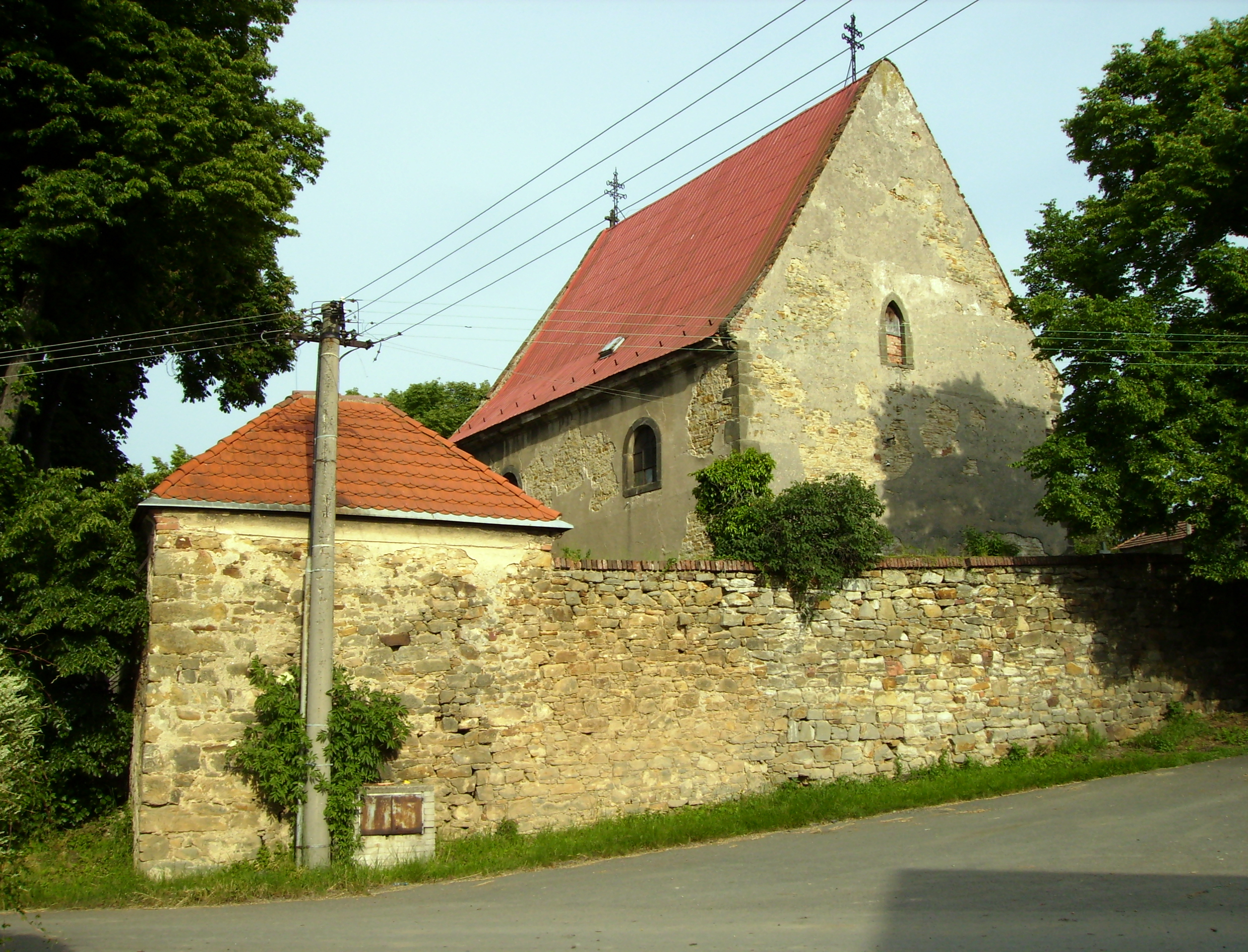 Kostel sv. Havla ve Vykáni / St Gall church in Vykáň